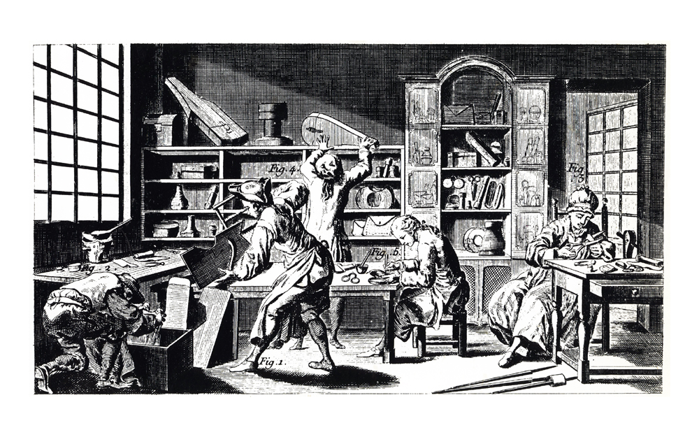 Atelier du Gainier au 18ème